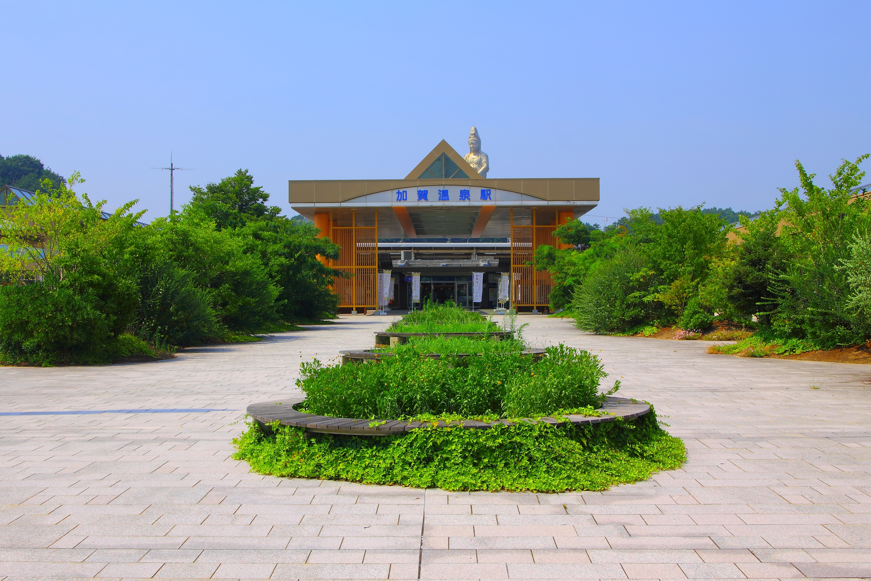 加賀温泉駅